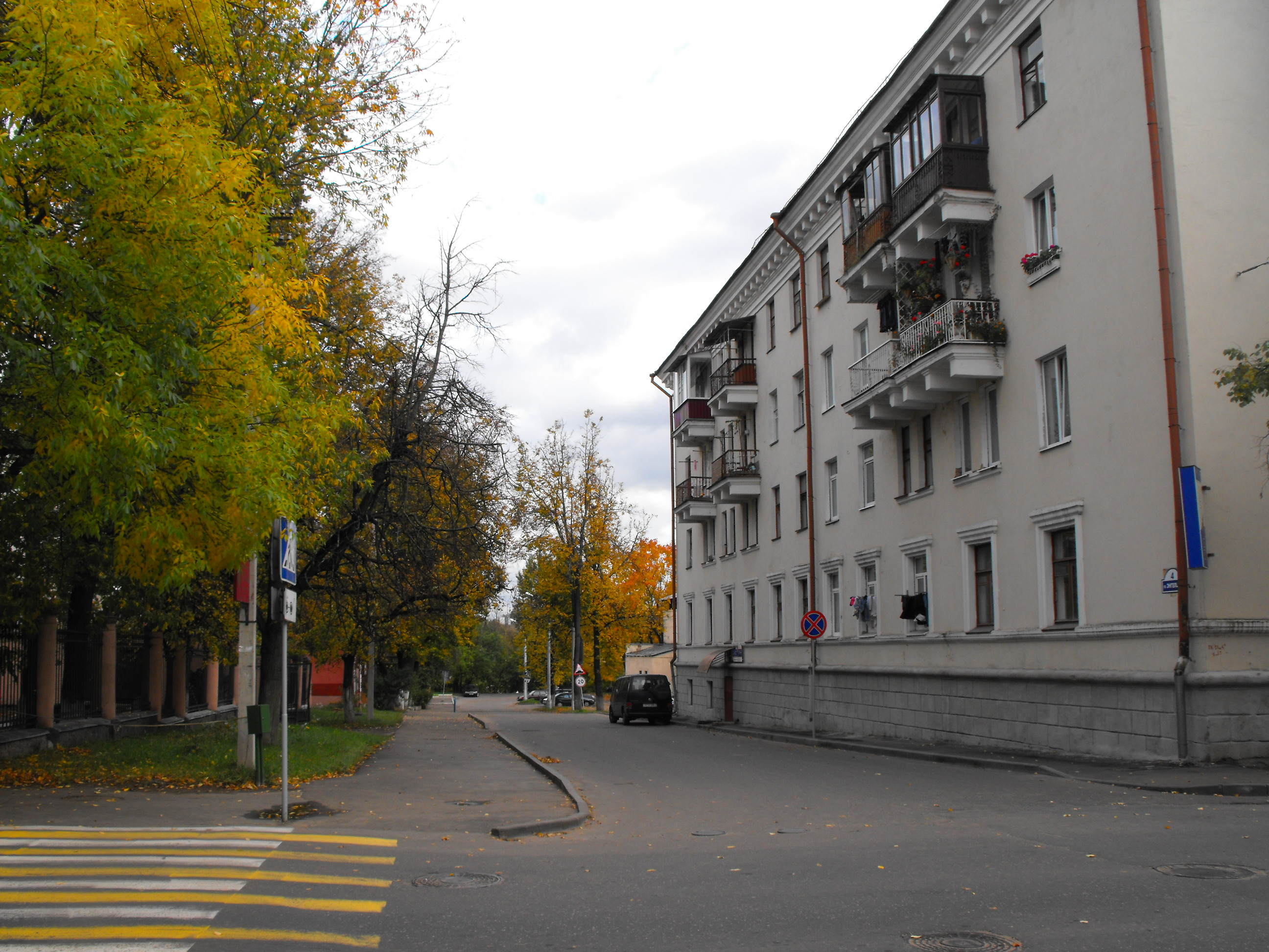 Территория бывшего гетто в Витебске в 1941 году. Занимало район клуба металлистов (здание в центре фотографии) и территорию в пределах нынешних улиц Набережной, Ильинского, Кирова, Комсомольской и Энгельса. На снимке - угол улиц Комсомольской и Энгельса (дом № 4), гетто занимало квартал справа.